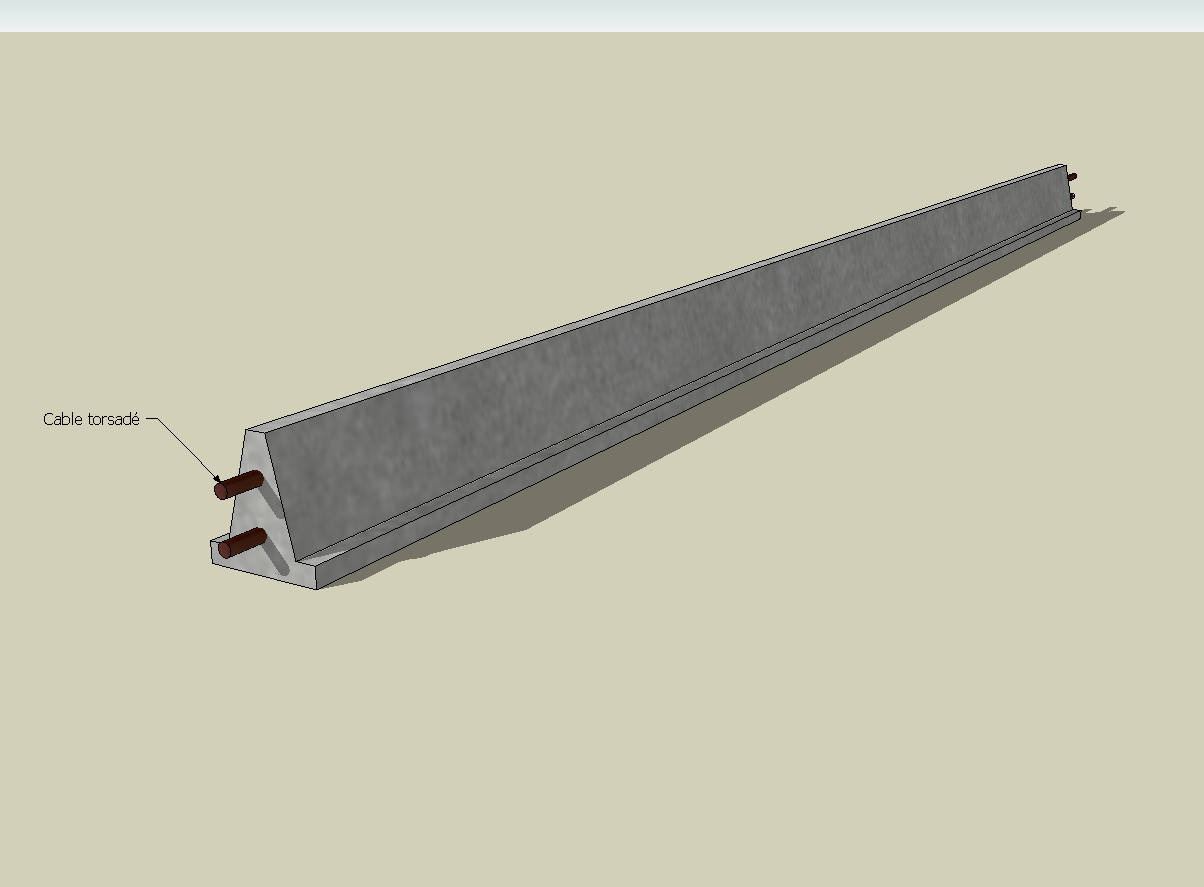 Poutrelle en béton constitutive d'une plancher béton